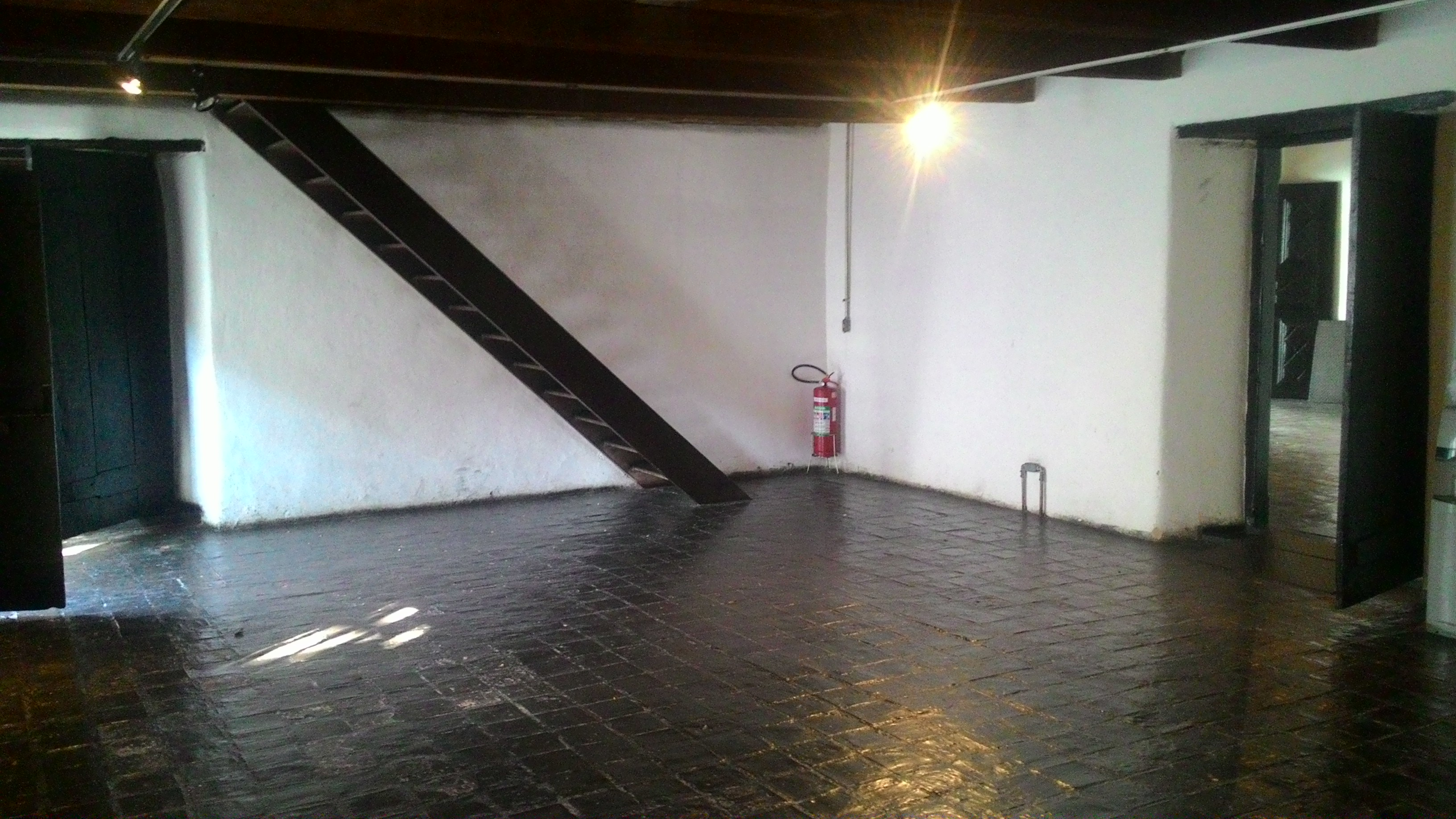 Cômodo com acesso para o segundo andar da Casa do Sítio Tatuapé, em São Paulo (SP), Brasil.